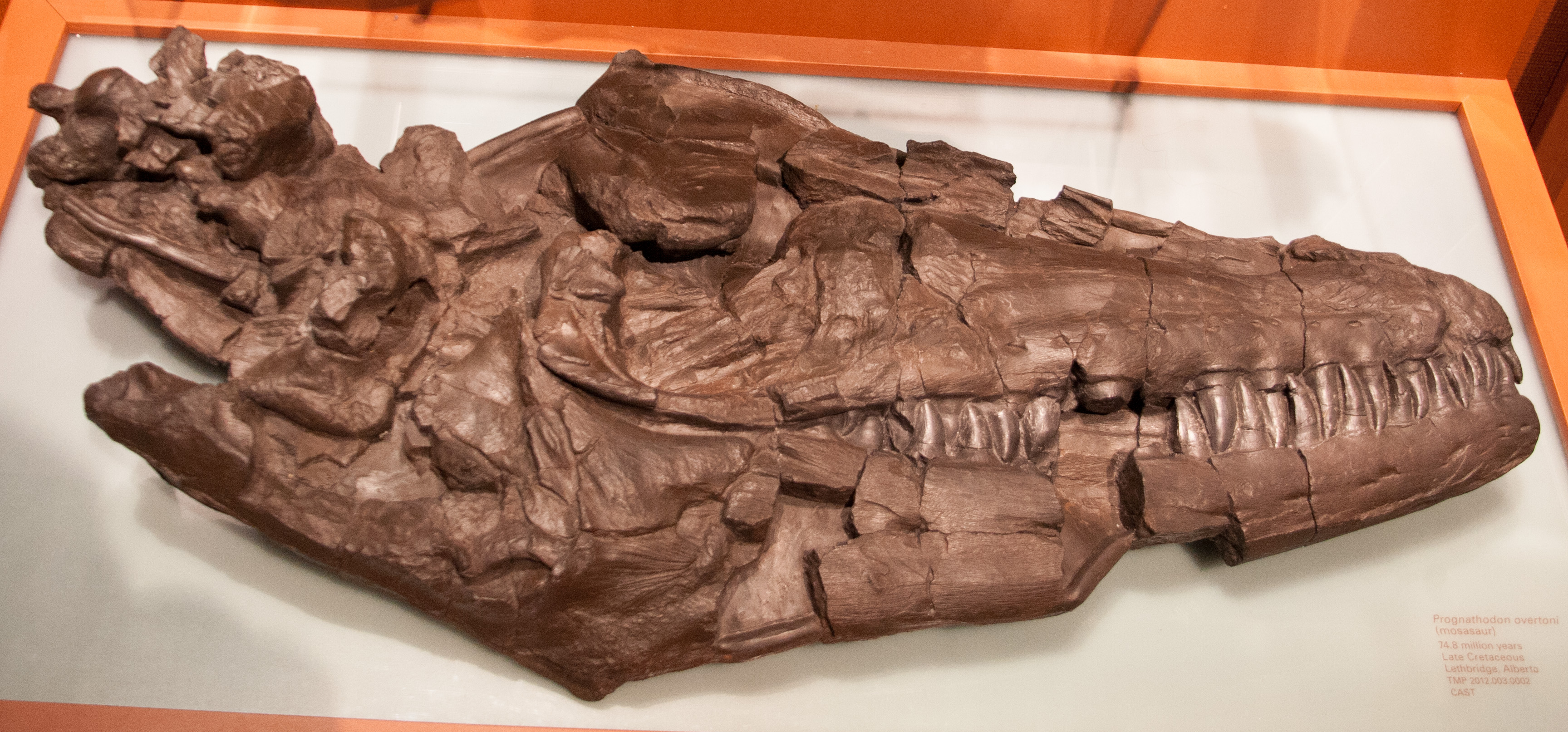 5d-dinosaur-camp-day2-20120802-66.jpg